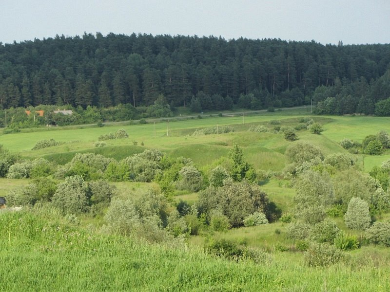 Ваўкавыск. Муравельнік